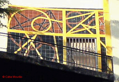 thumb